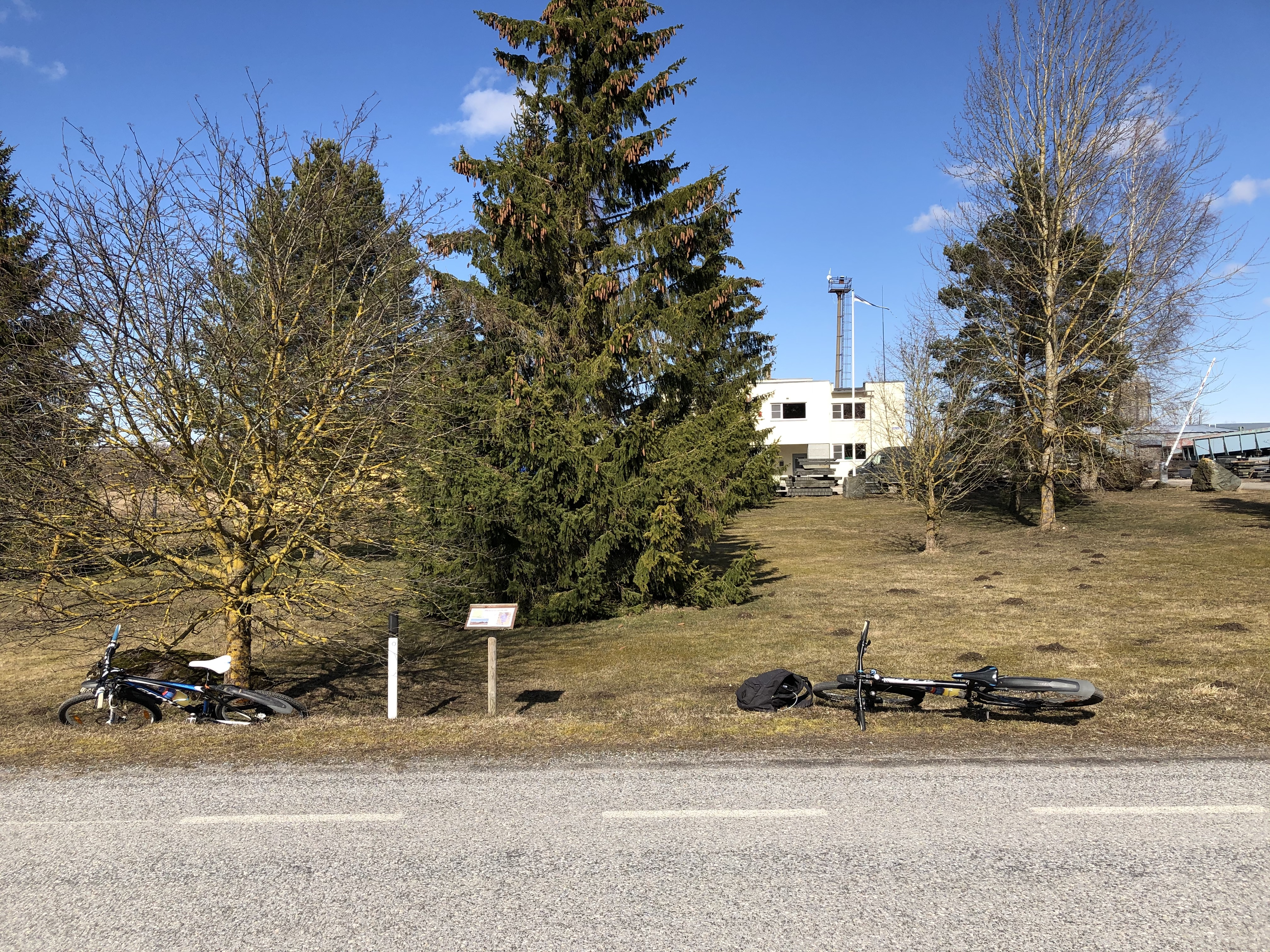 Muinasasulakoht